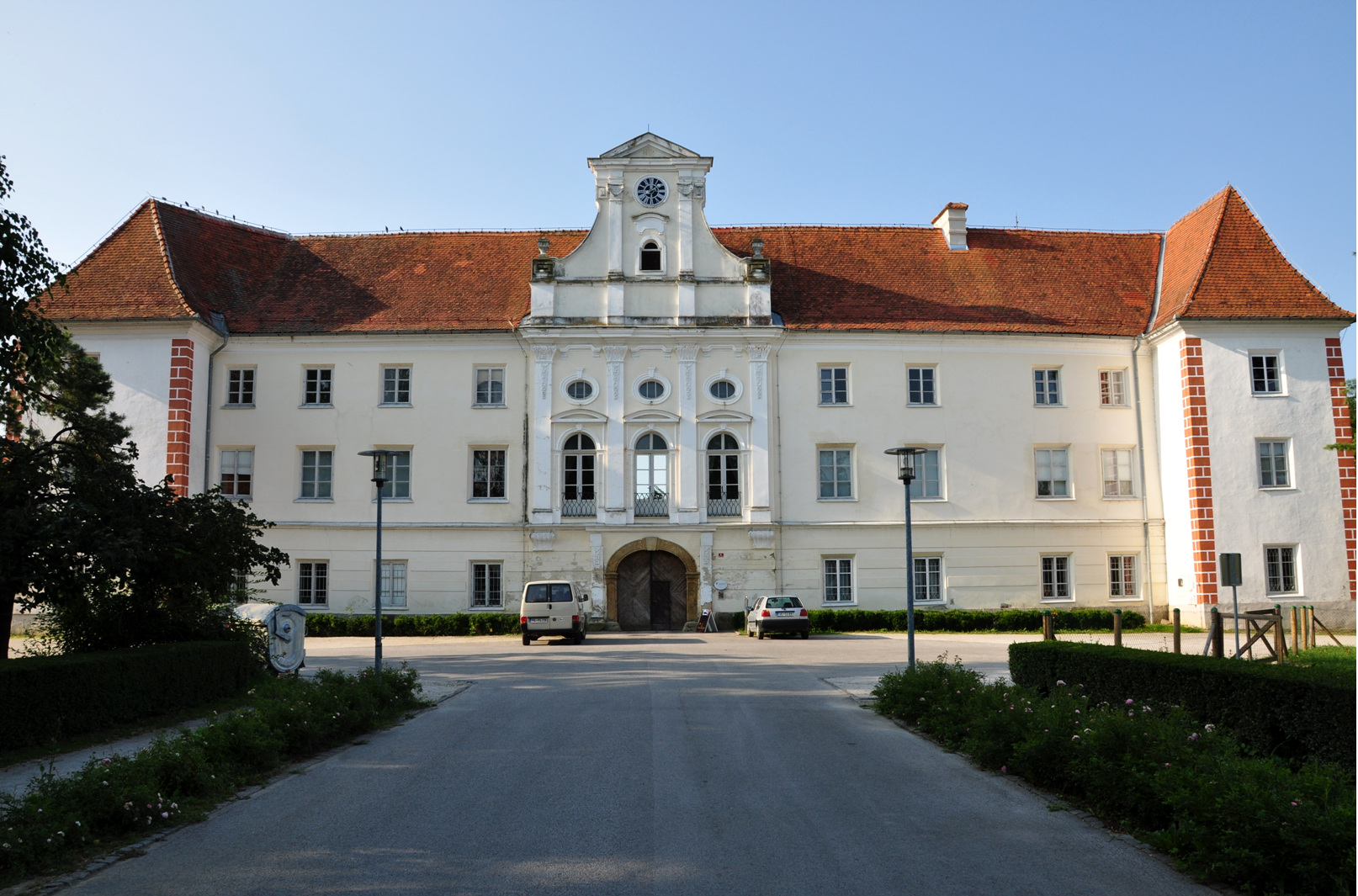 Szapáry-várkastély